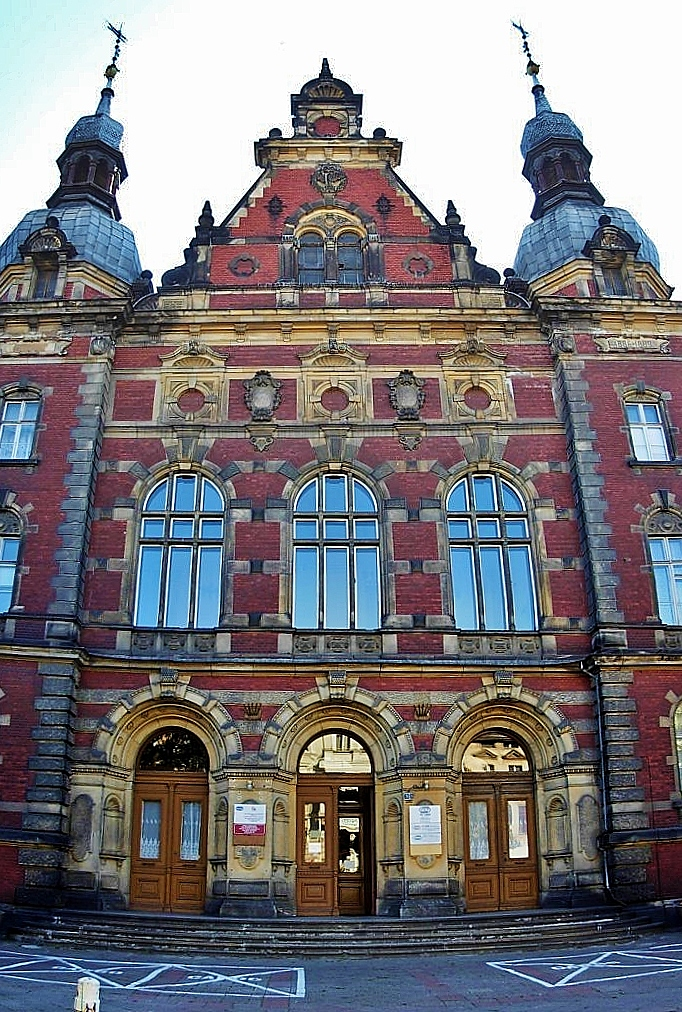 Gmach byłej Dyrekcji Kolei Wschodniej w Bydgoszczy